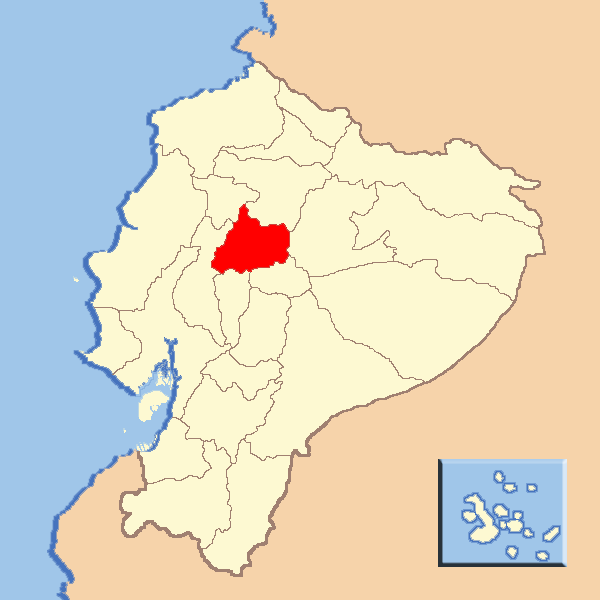 Provincia de Cotopaxi